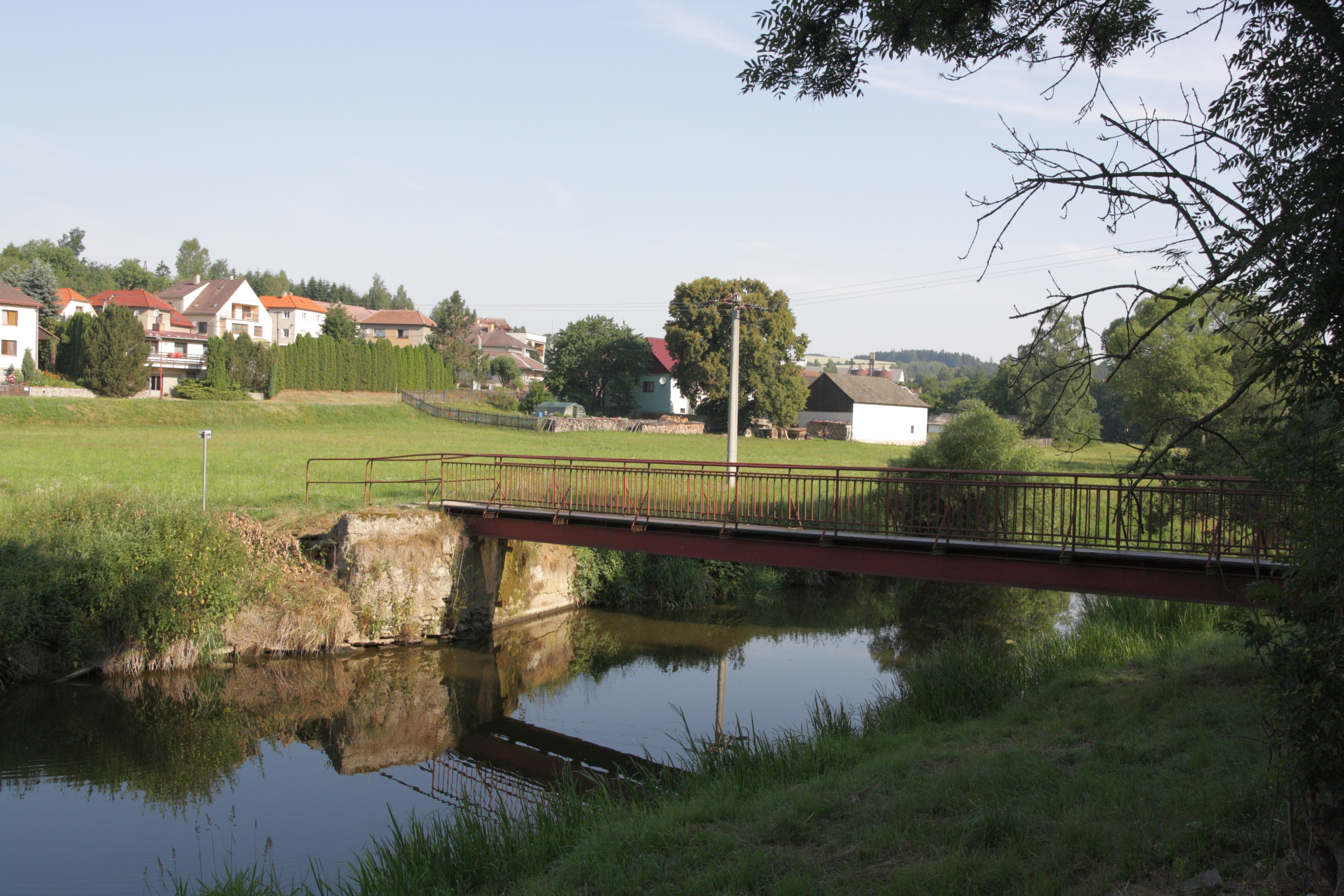 Bítovčice - lávka přes Jihlavu.